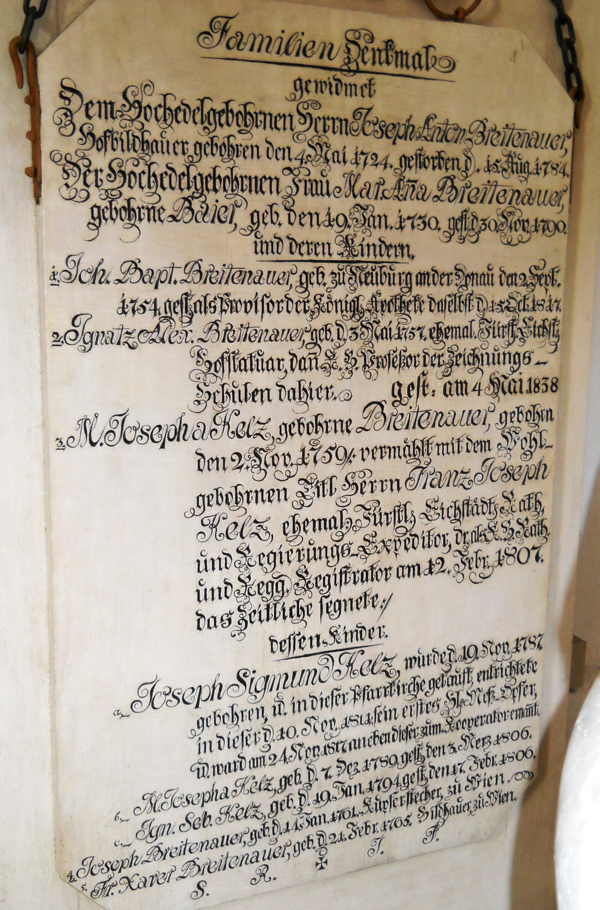 Denkmal der Familie der Breitenauer in der Pfarr- und Klosterkirche St. Walburg in Eichstätt (Oberbayern)